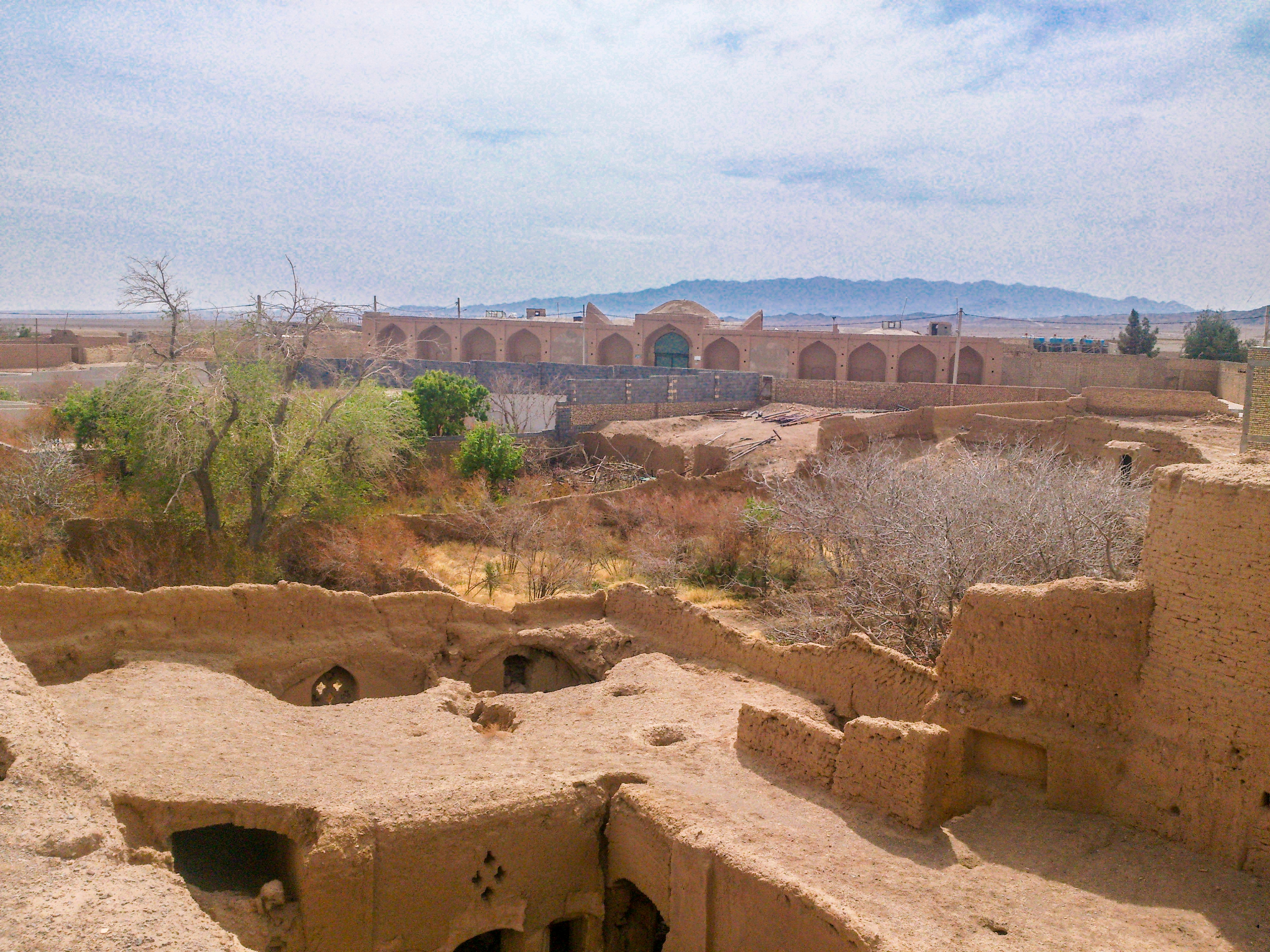 نمایی از پشت بام قلغه ساغند